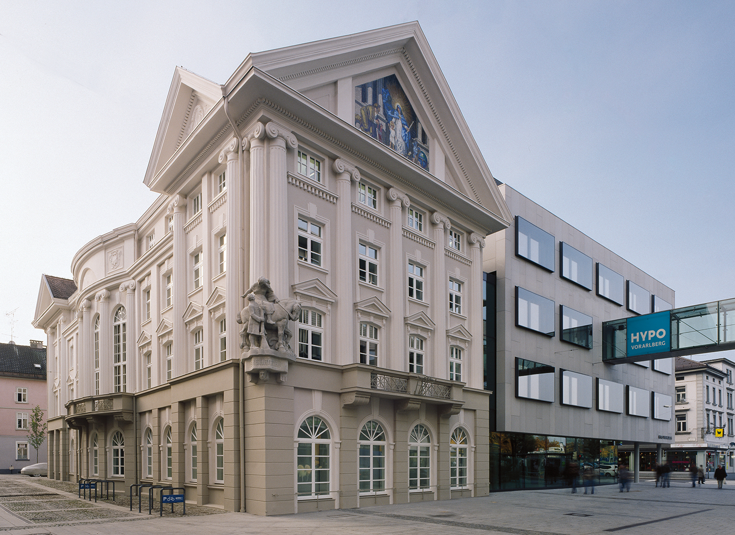 Neubau Hypo Vorarlberg Zentrale in Bregenz - inkl. "Altes Landhaus"